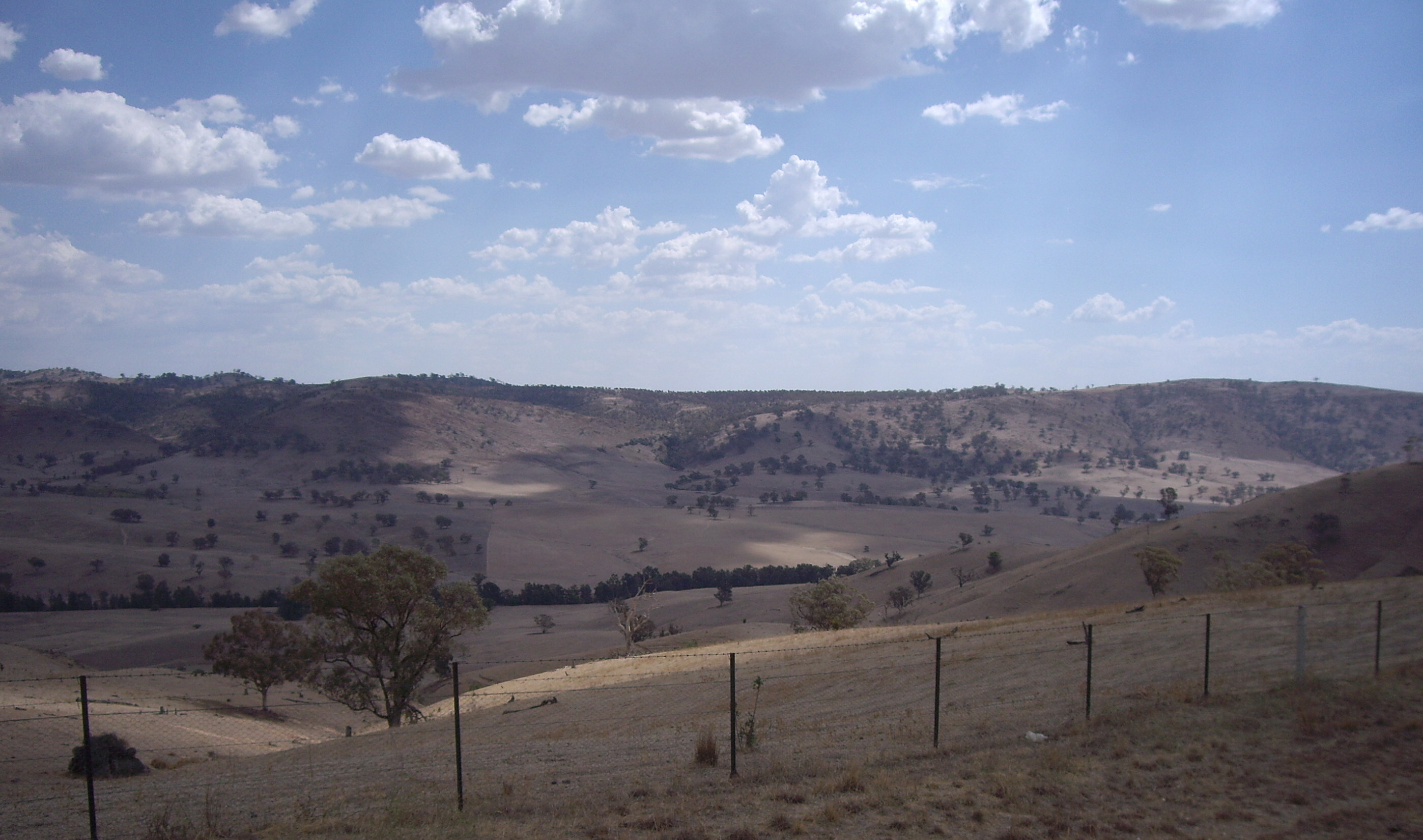 Gobarralong Valley